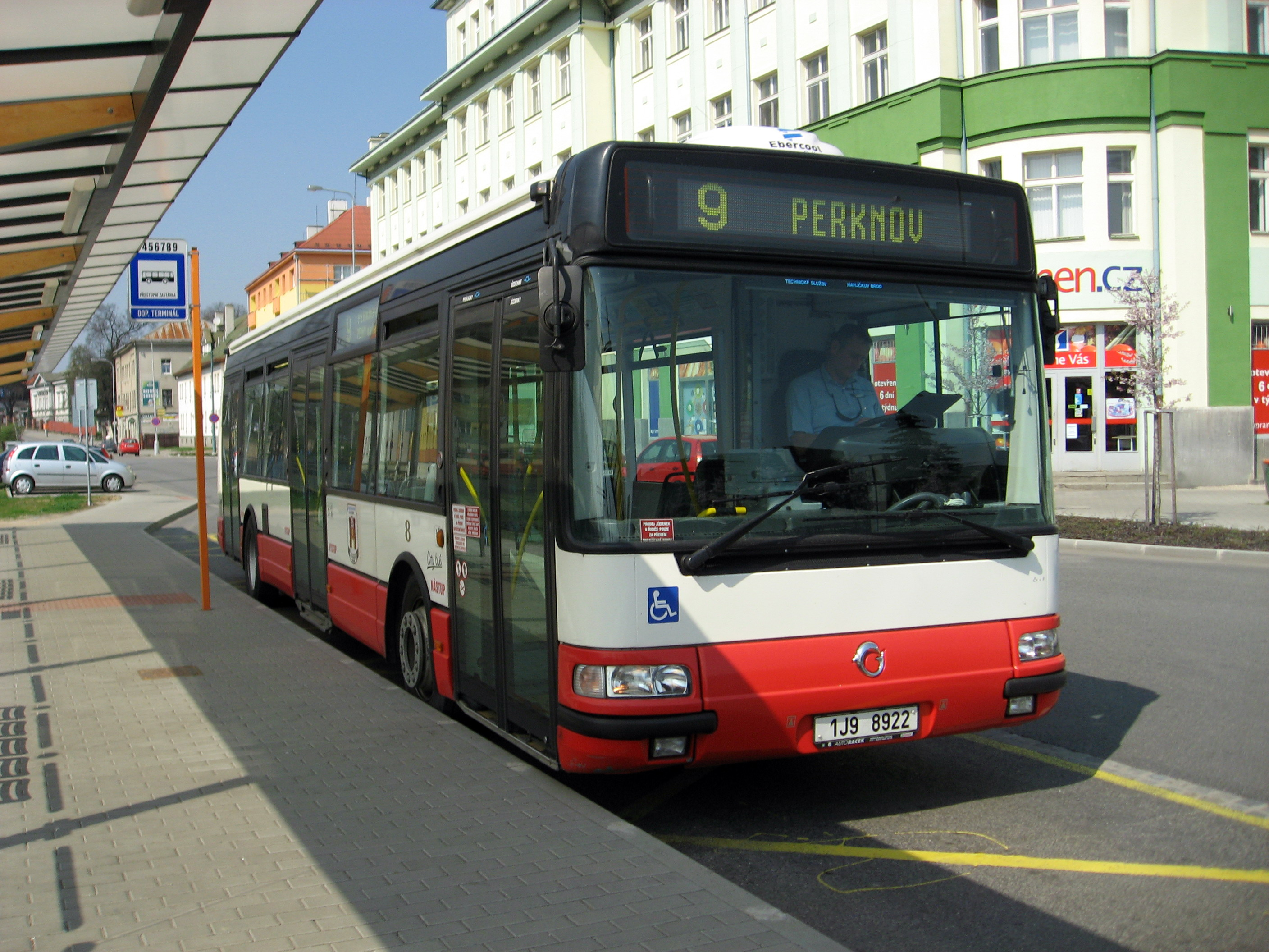 Autobus Irisbus Agora v Havlíčkově Brodě